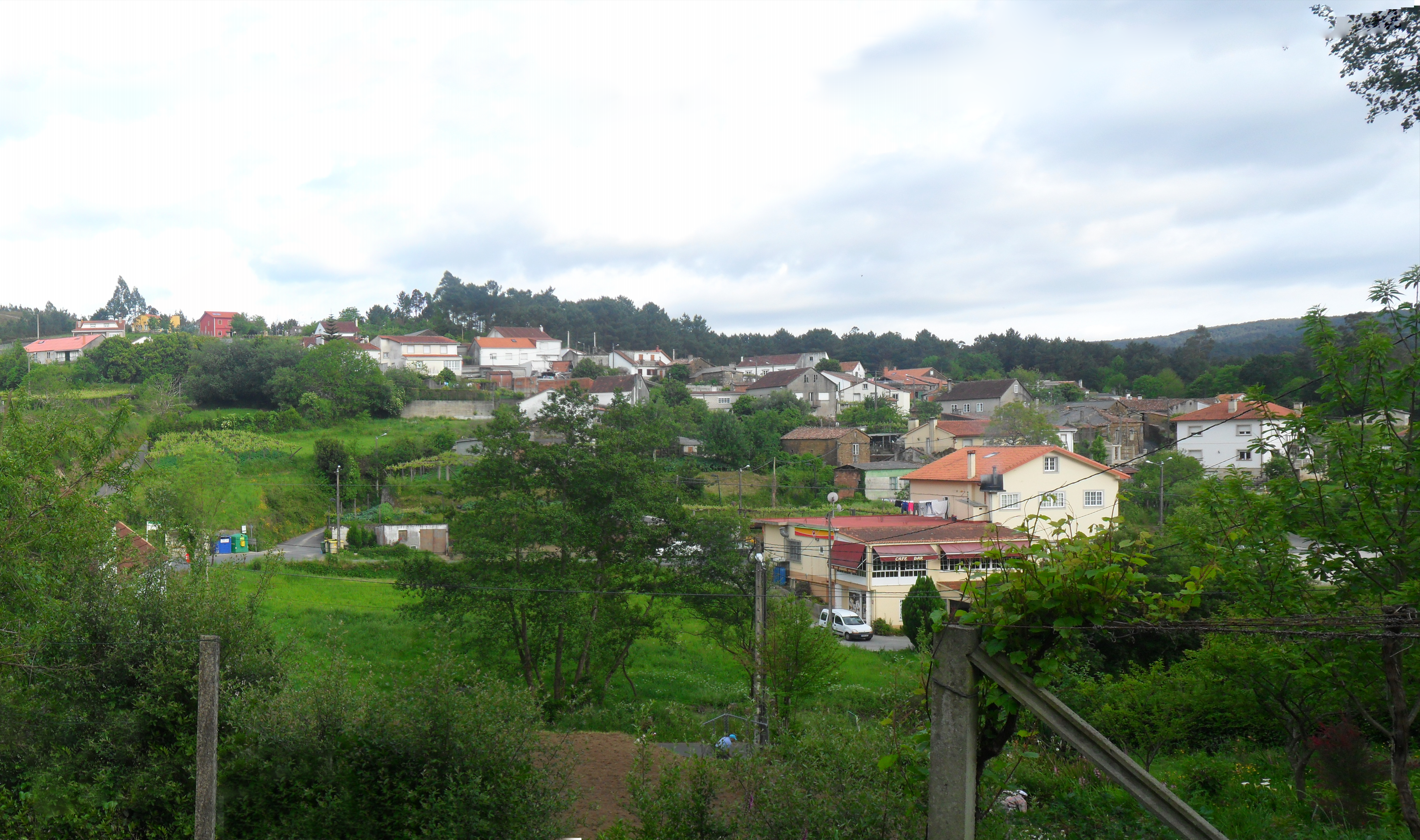 Aldeagrande de Lousame